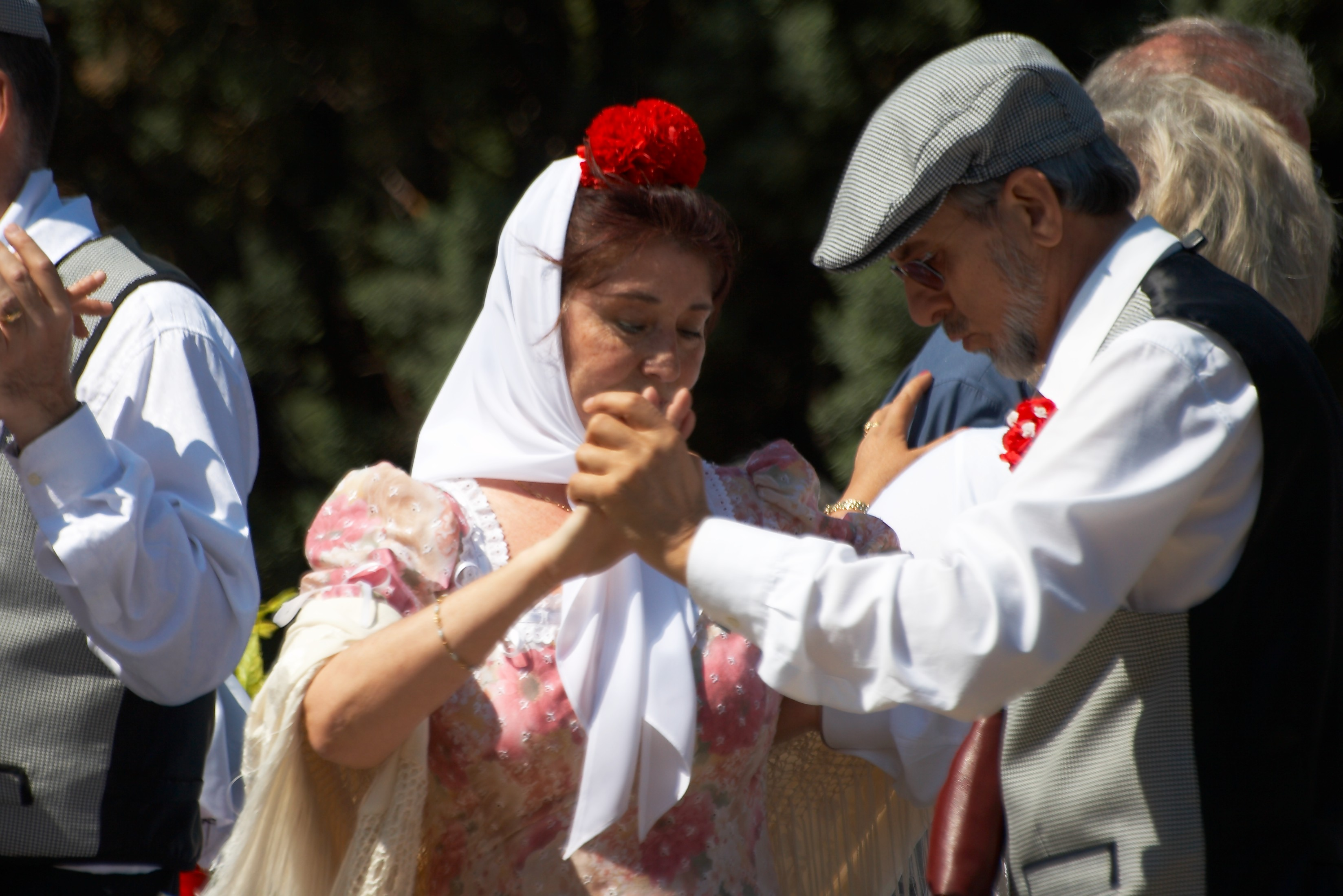 Chulapos. Fiestas de San Isidro 2007, Madrid, España.